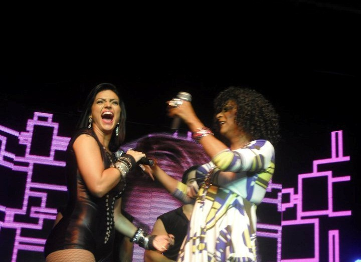 Show da cantora Kelly Key em 2011.